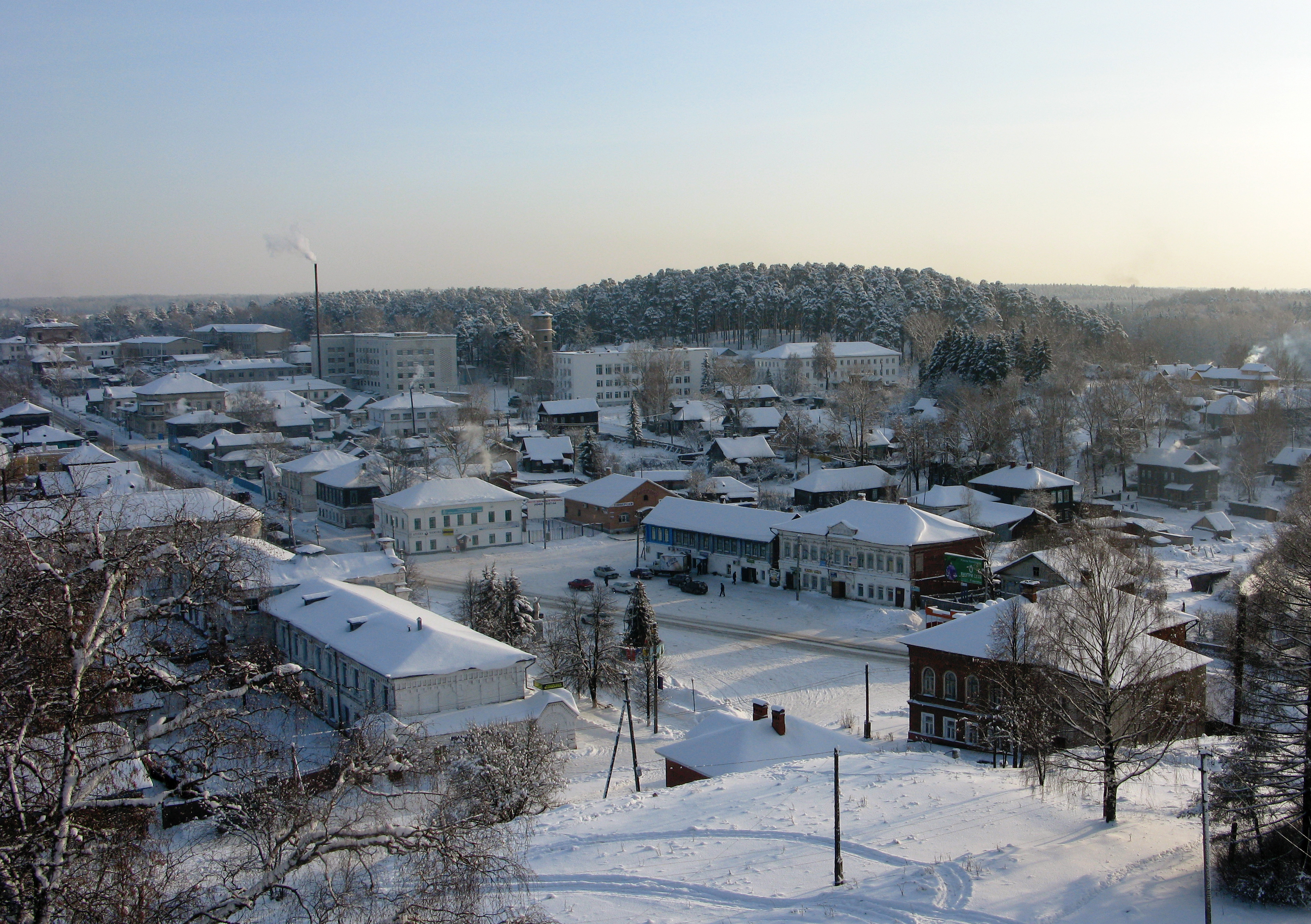 Sudislavl, Kostroma Oblast, Russia, 157860